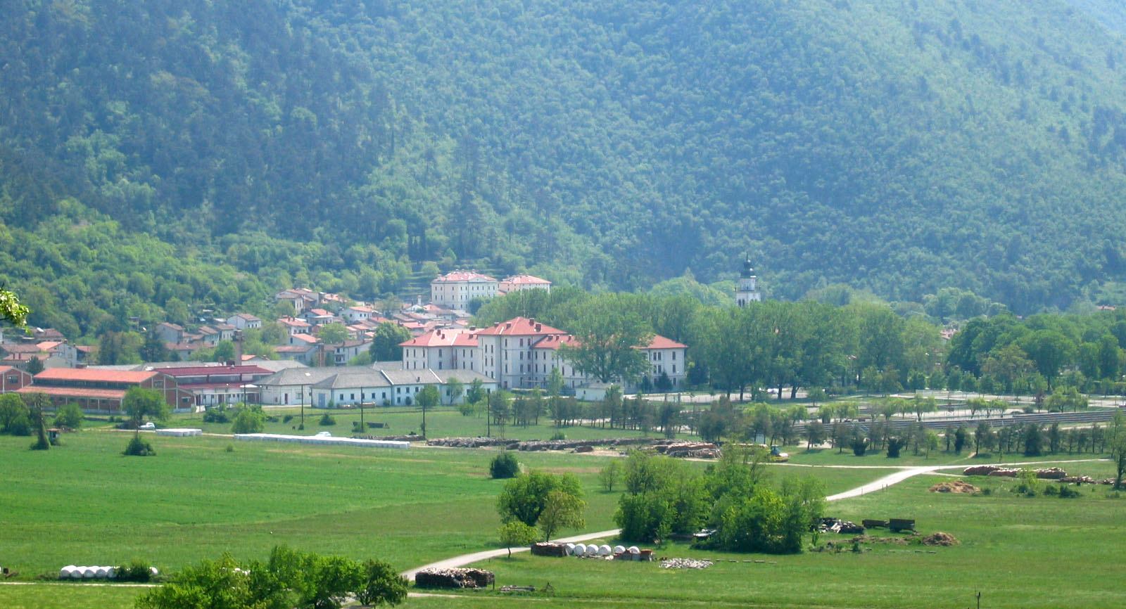 Vipava, town in Slovenia